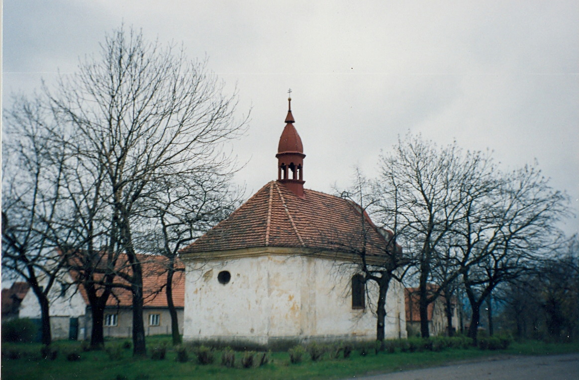 Kaple sv. Anny (Bezděkov), náves, Bezděkov